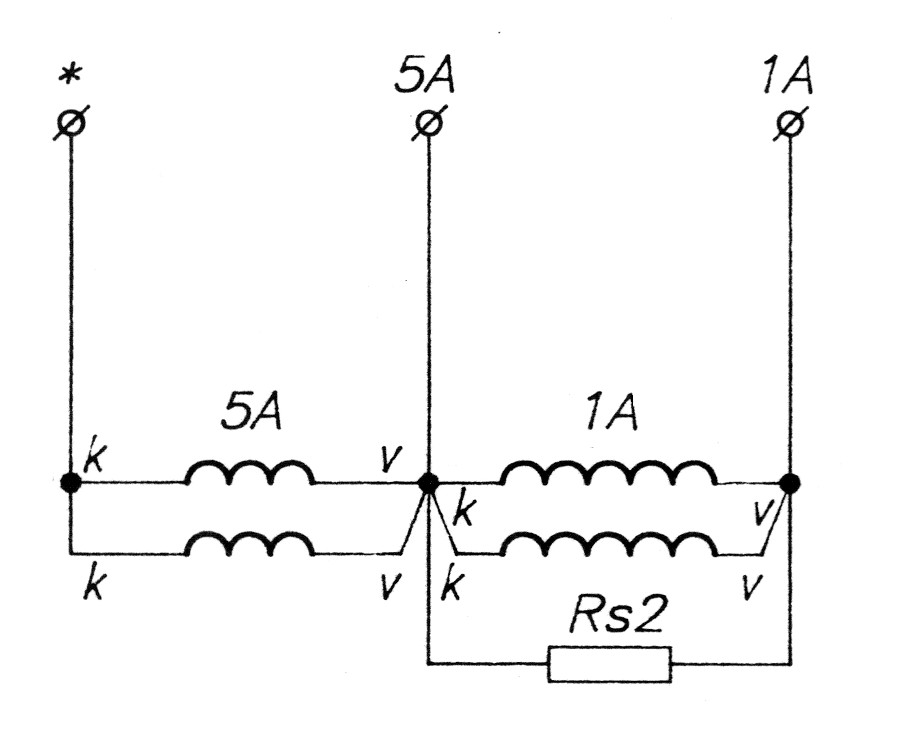 Söntellenállás elhelyezése a műszer áramágában